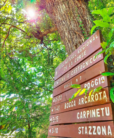 Les sentiers de Castagniccia